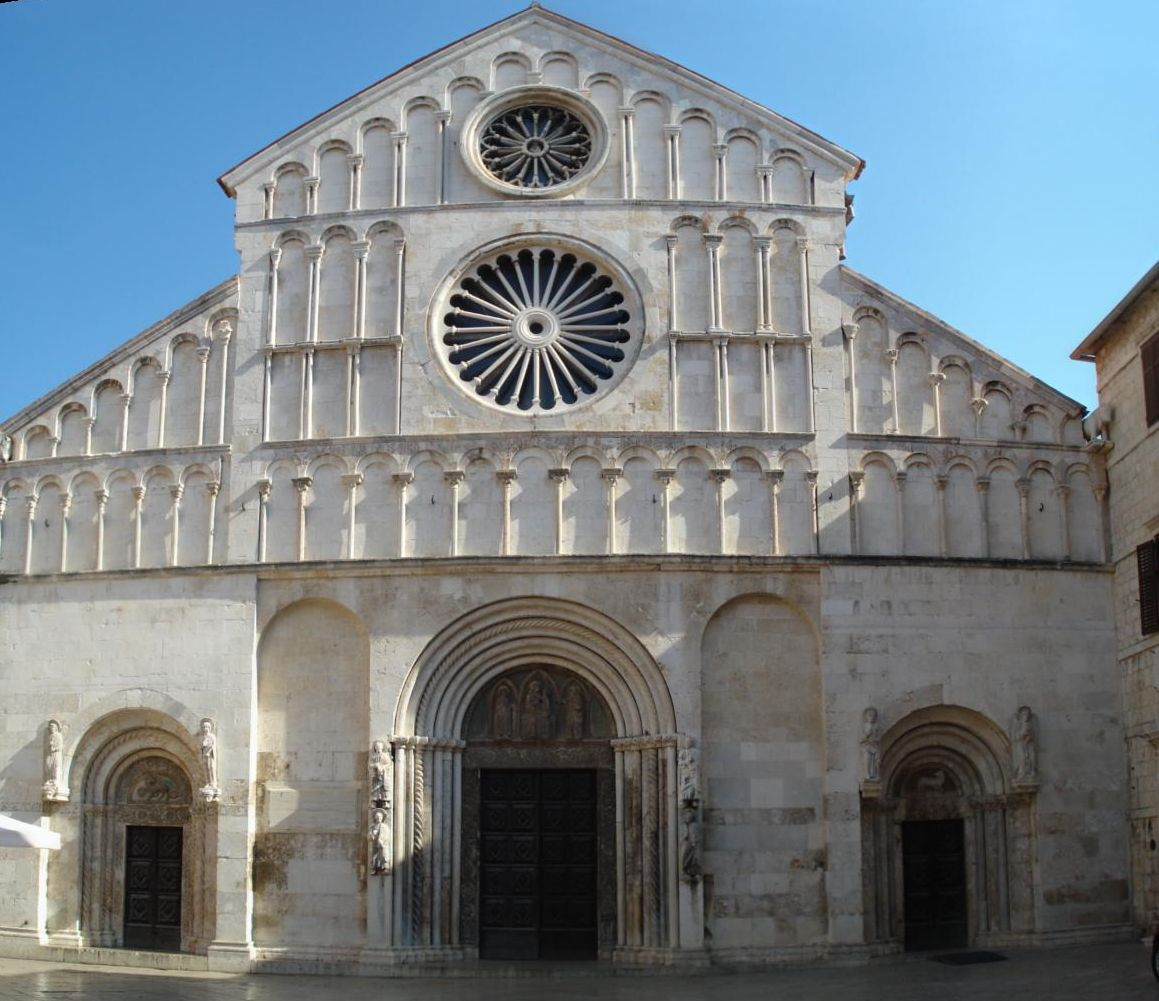 Katedrala Svete Stošije u Zadru